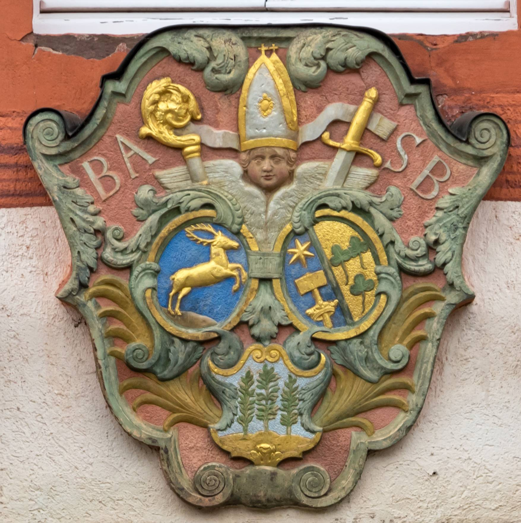 Schloss Bonndorf im Schwarzwald, Klosterwappen und Wappen Blasius Bender, Abt von St. Blasien